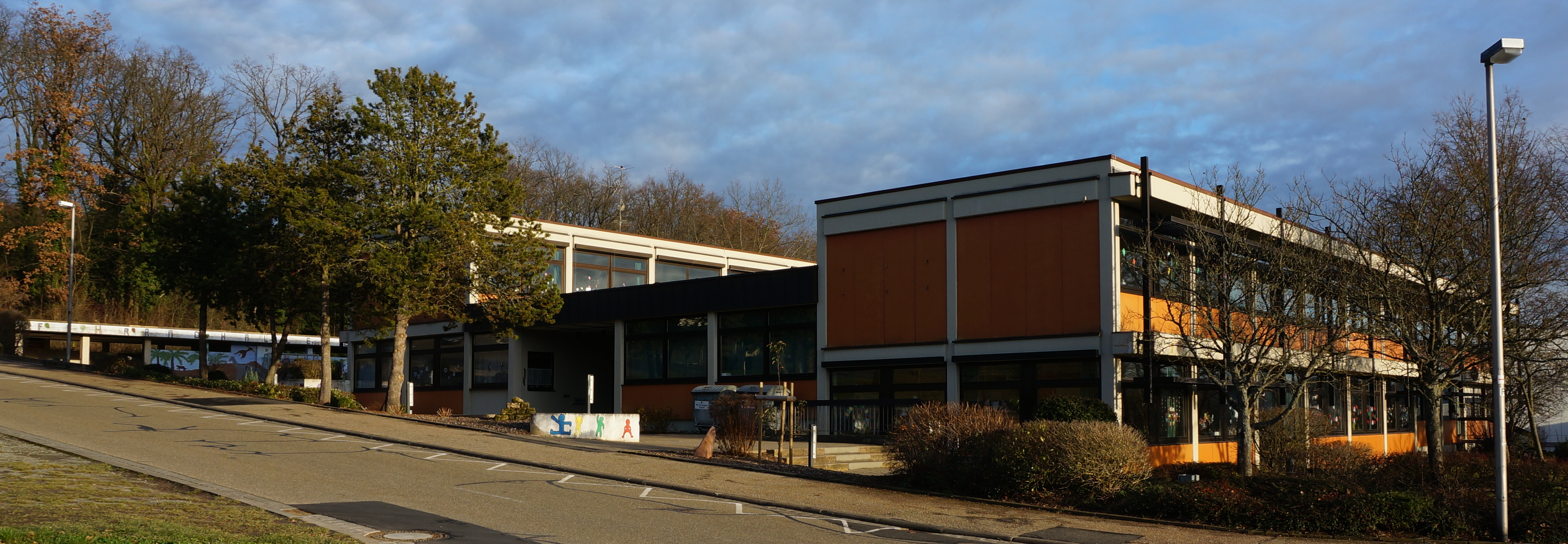 Das Bild zeigt die Grundschule in Lengfurt, in der Spessartstraße 20. Links ist die Fahrradhalle zu sehen